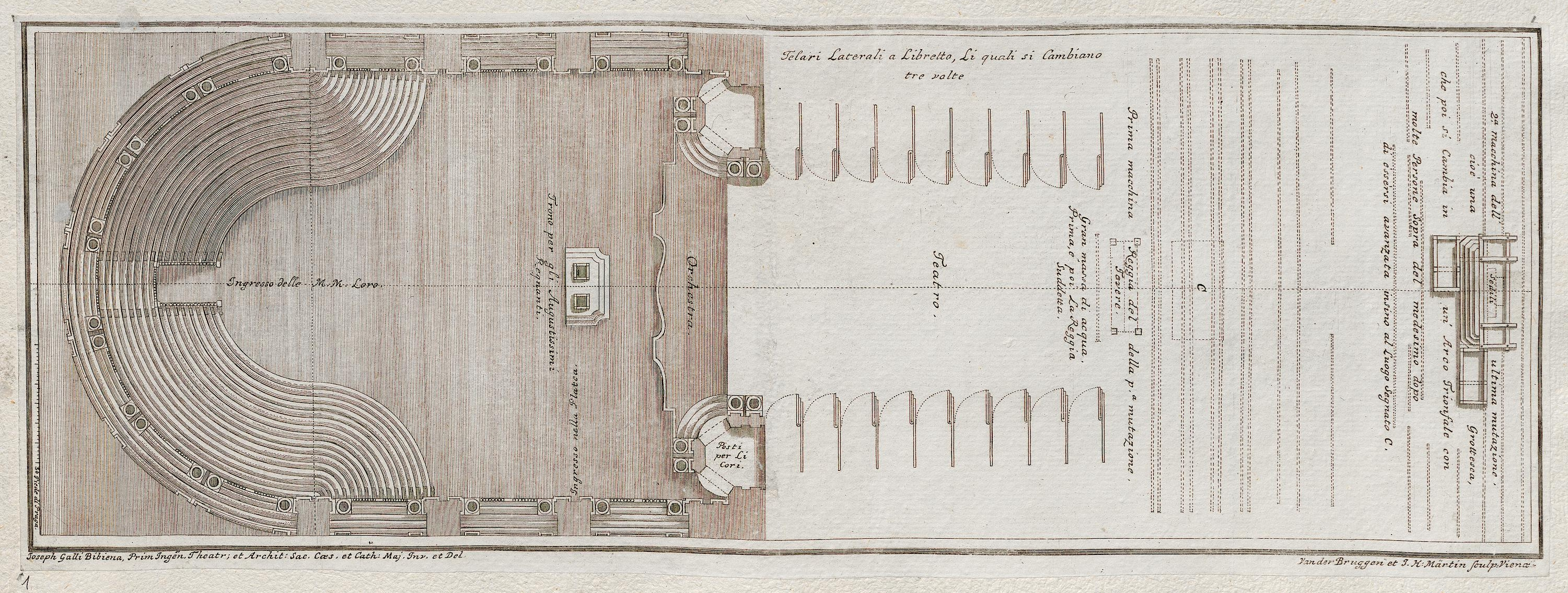 Grafik aus dem Klebeband Nr. 15 der Fürstlich Waldeckschen Hofbibliothek Arolsen Costanza e fortezza, Oper von Johann Joseph Fux (Musik), Pietro Pariato (Libretto), uraufgeführt 28. August 1723 in Prag zur Krönung Karl VI. zum König von Böhmen. Theaterarchitektur und Bühnenbilder von Giuseppe Galli da Bibiena. Motiv: Plan des offenen Barocktheaters in Prag, das Galli Bibiena für die Aufführung 1732 erbaut hatte